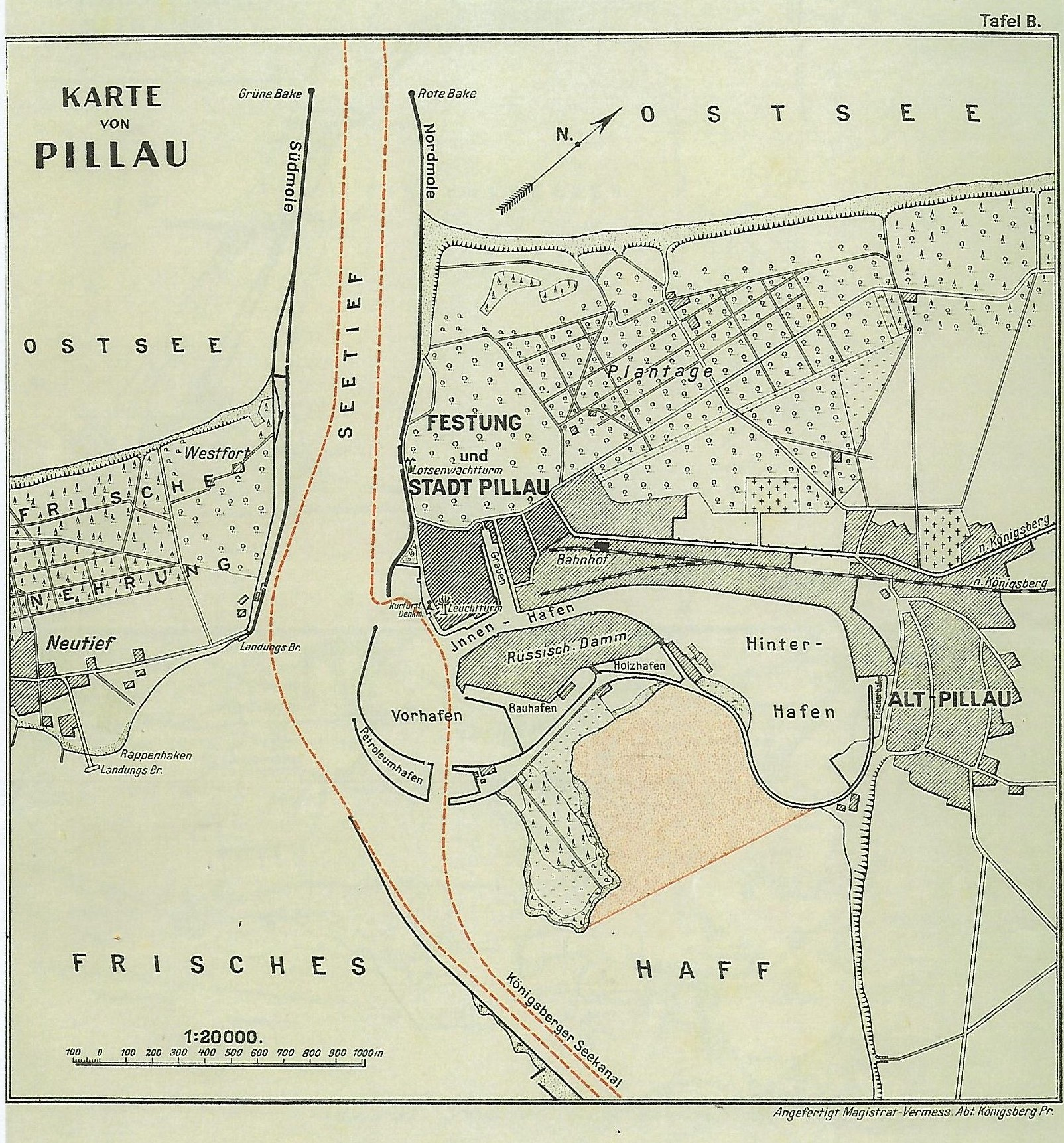 Karte von Festung, Stadt und Hafen Pillau